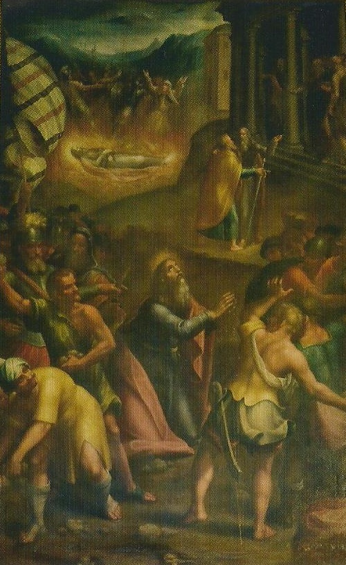 Martirio de san Bernabé, El Escorial, retablo mayot de la parroquia de San Bernabé